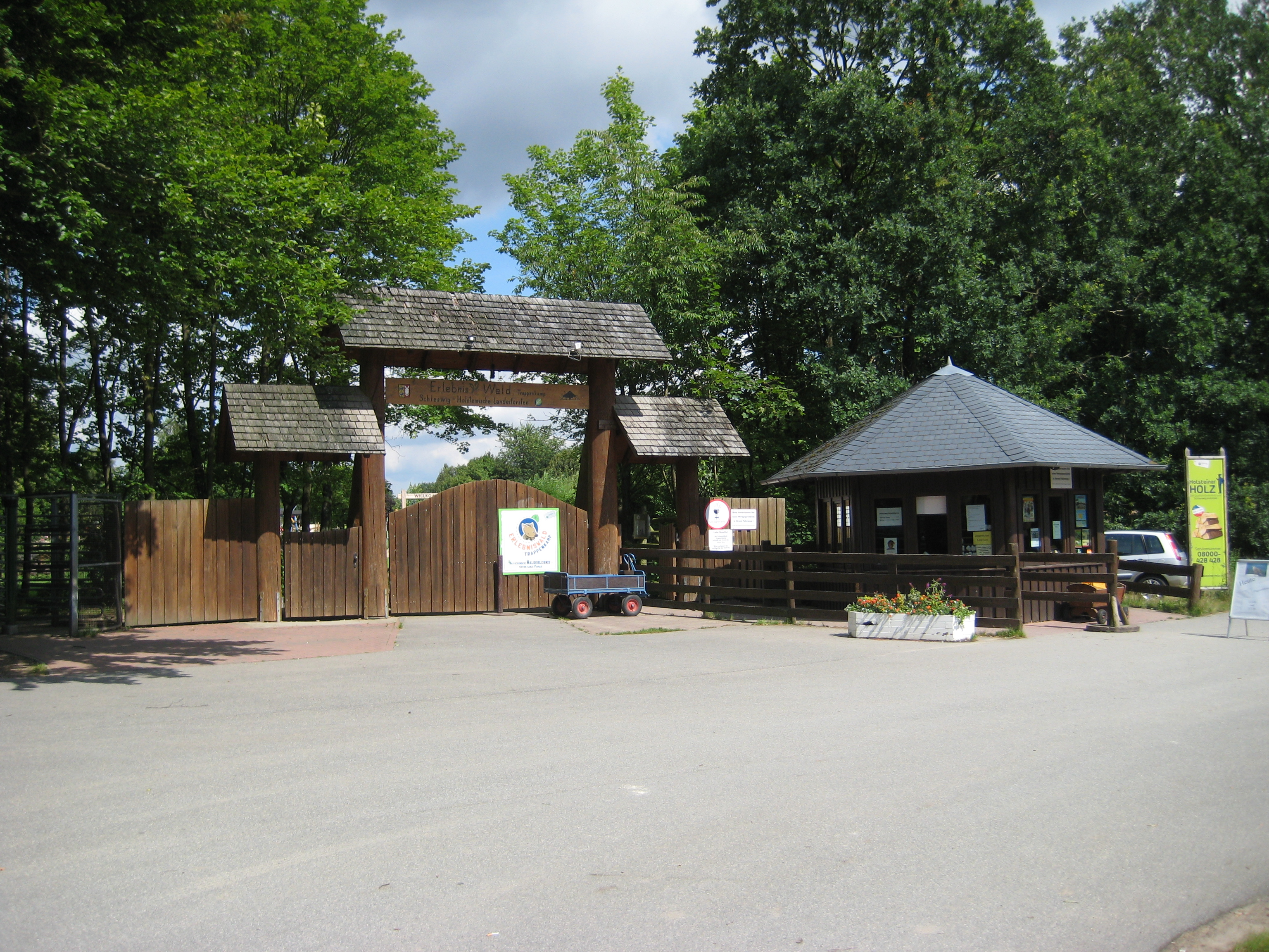 Erlebniswald Trappenkamp